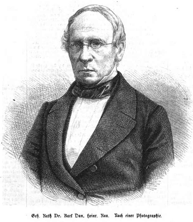 Karl Daniel Heinrich Rau, Professor der Staatswirtschaftslehre an der Universität Heidelberg, 1862.